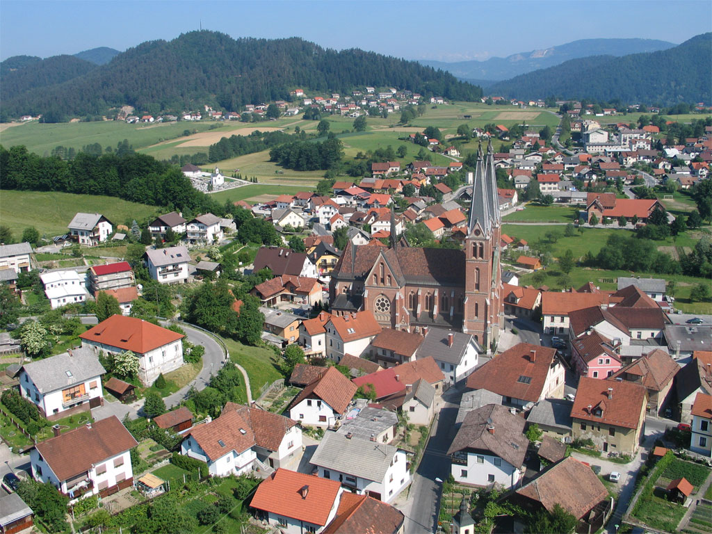 Šmartno pri Litiji z zraka.